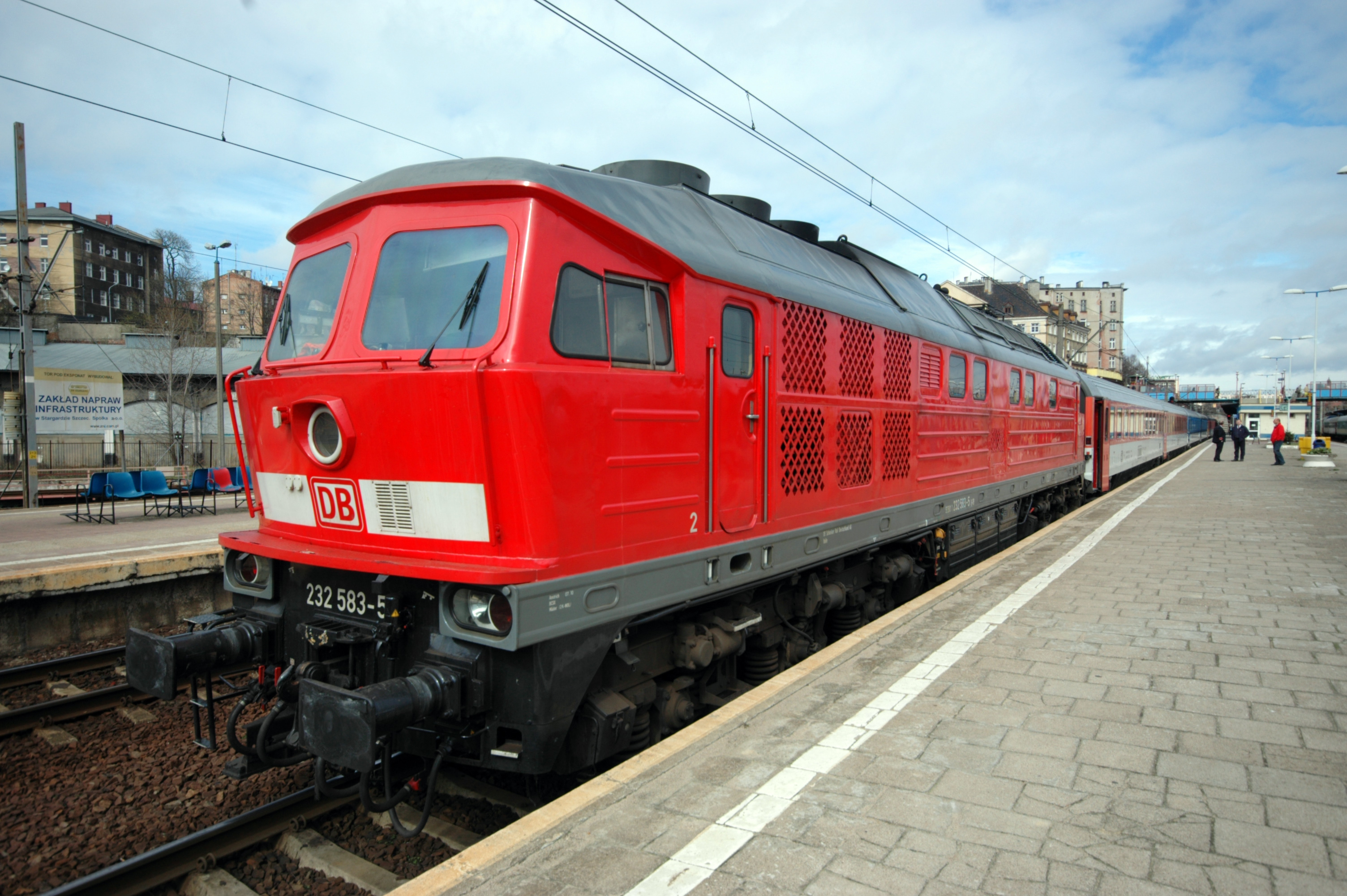 Außenansicht Eurocity Szczecin - Prag, Lok 232 583-5 im Bahnhof Szczecin Glowny